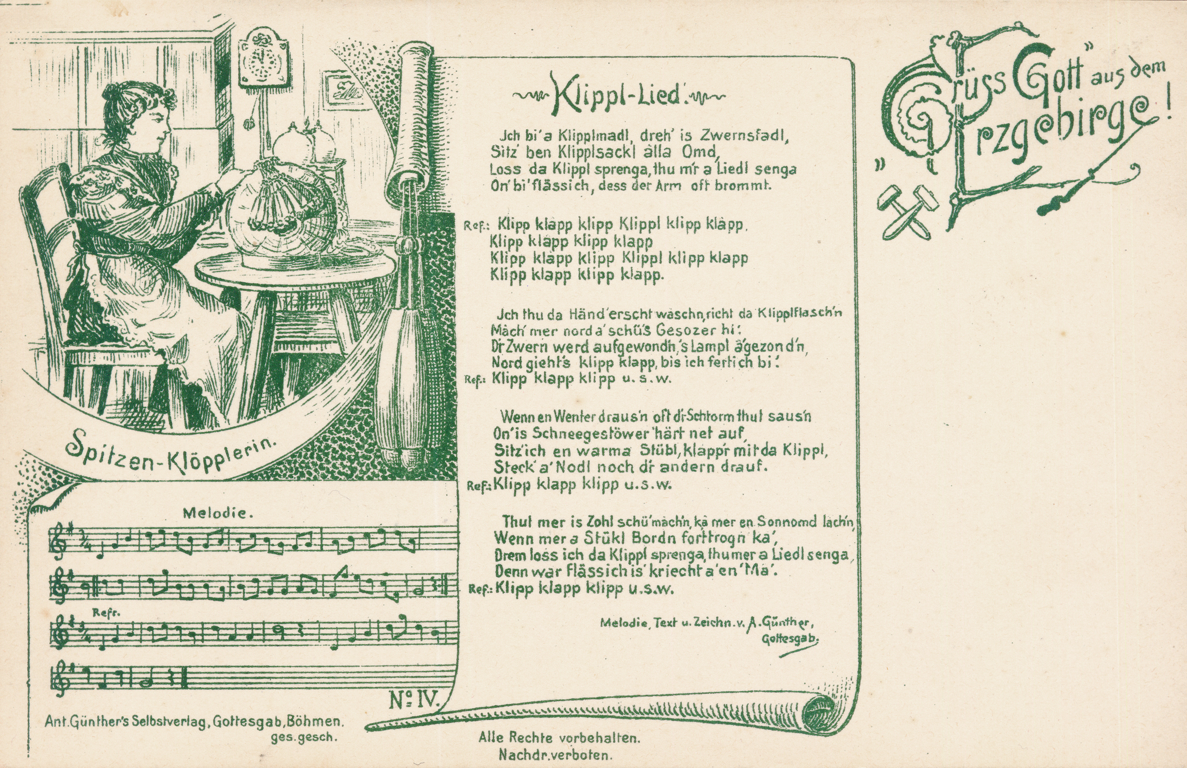 Die Liedpostkarte von Anton Günther mit dem Motiv IV - Klippl-Lied ca.1903